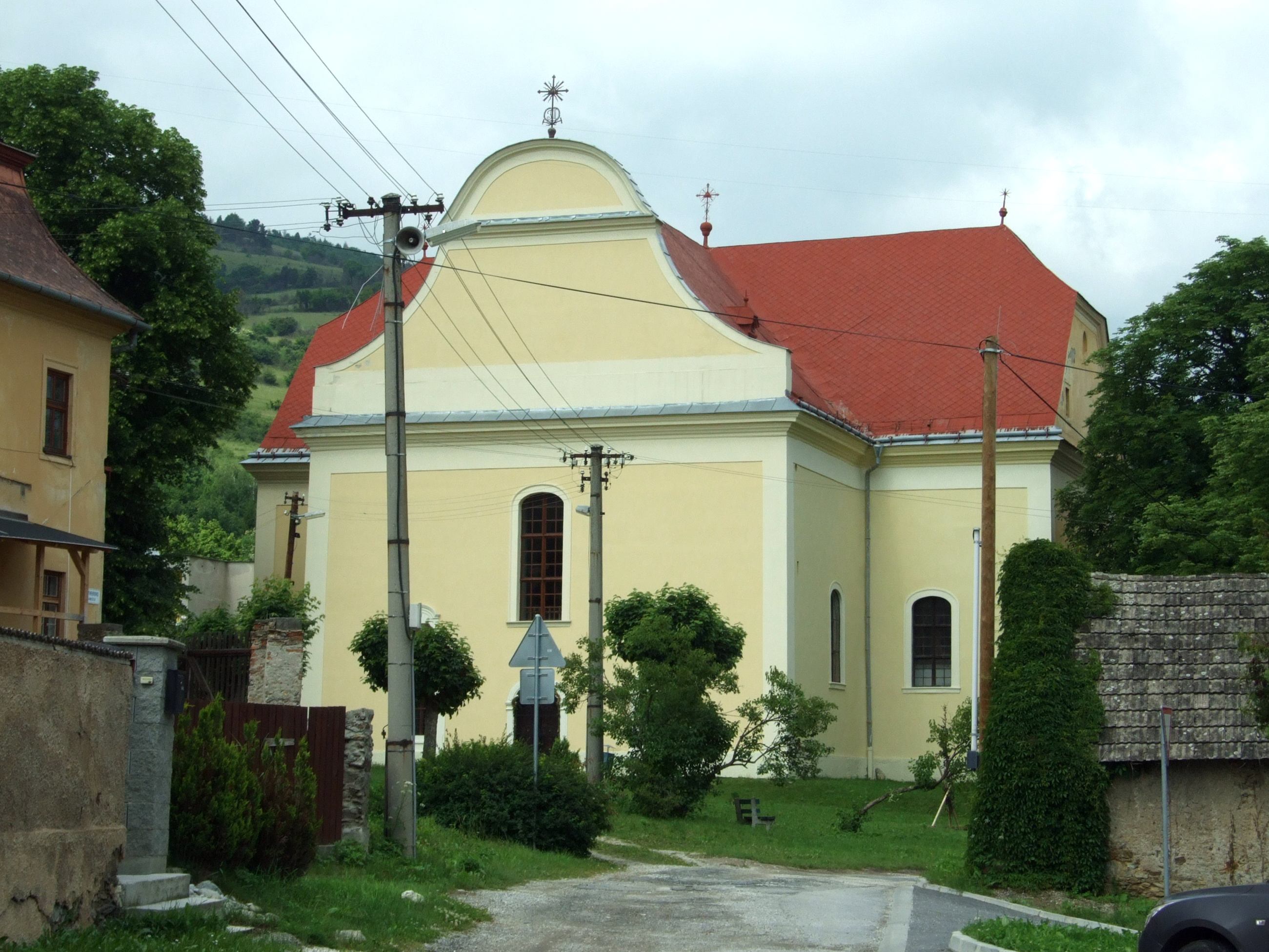 Evanjelický kostol, 1787